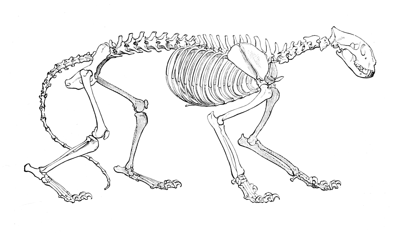 Tiger skeleton